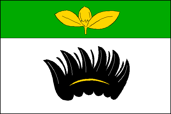 vlajka,Bukov , okres Žďár nad Sázavou